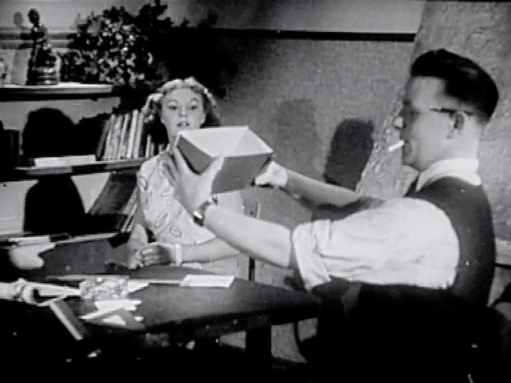 Outils à employer pour la soudure du zinc. Comment travailler le zinc et le souder.